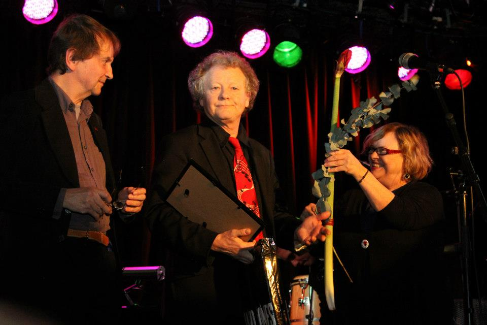 Bernt Andersson mottager hederspris på Spingo-stipendiets utdelning 2012.